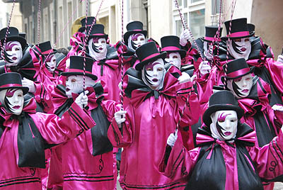 Bande Las Coudenos du carnaval de Limoux (Aude), place de la République.